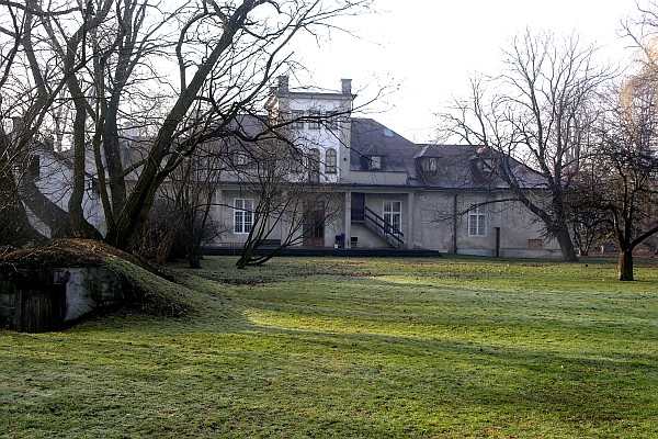 Dwór Potockich na Starej Olszy (ul. Sokołowskiego 19, Kraków)